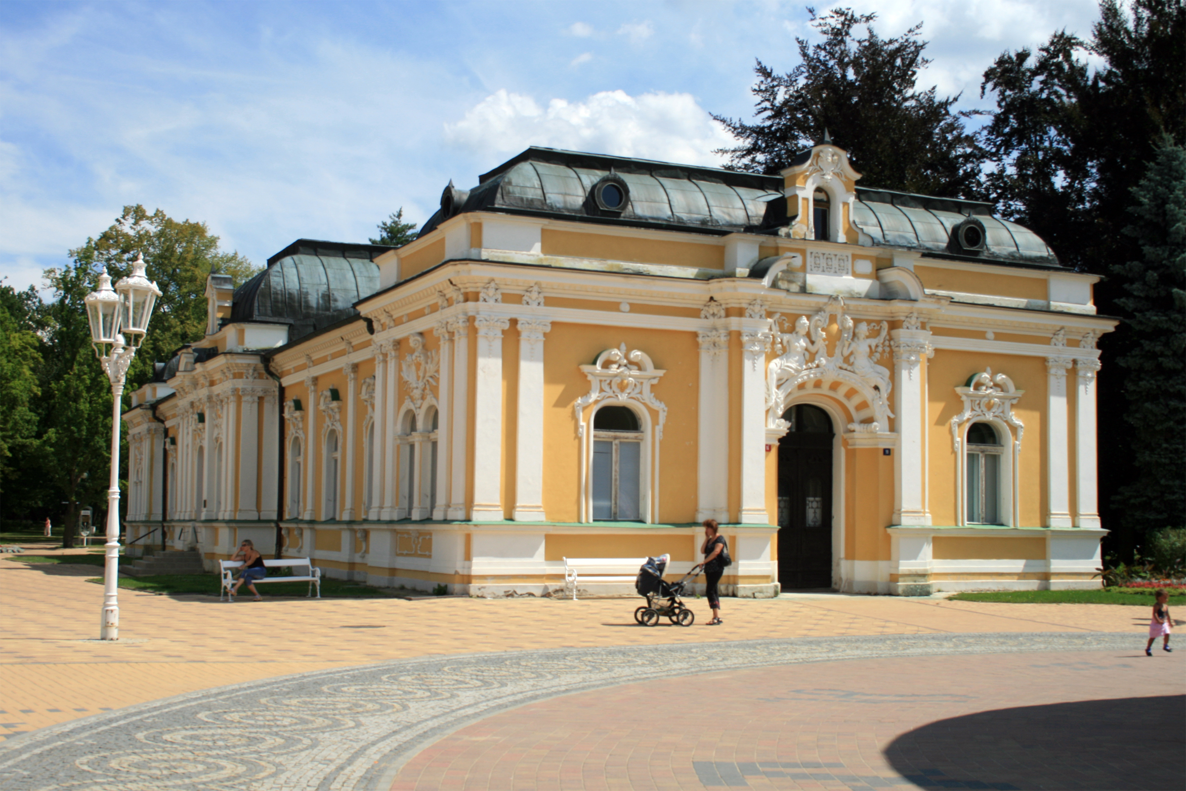 Nemocnice - lázeňská poliklinika, Národní 16/19, Františkovy Lázně